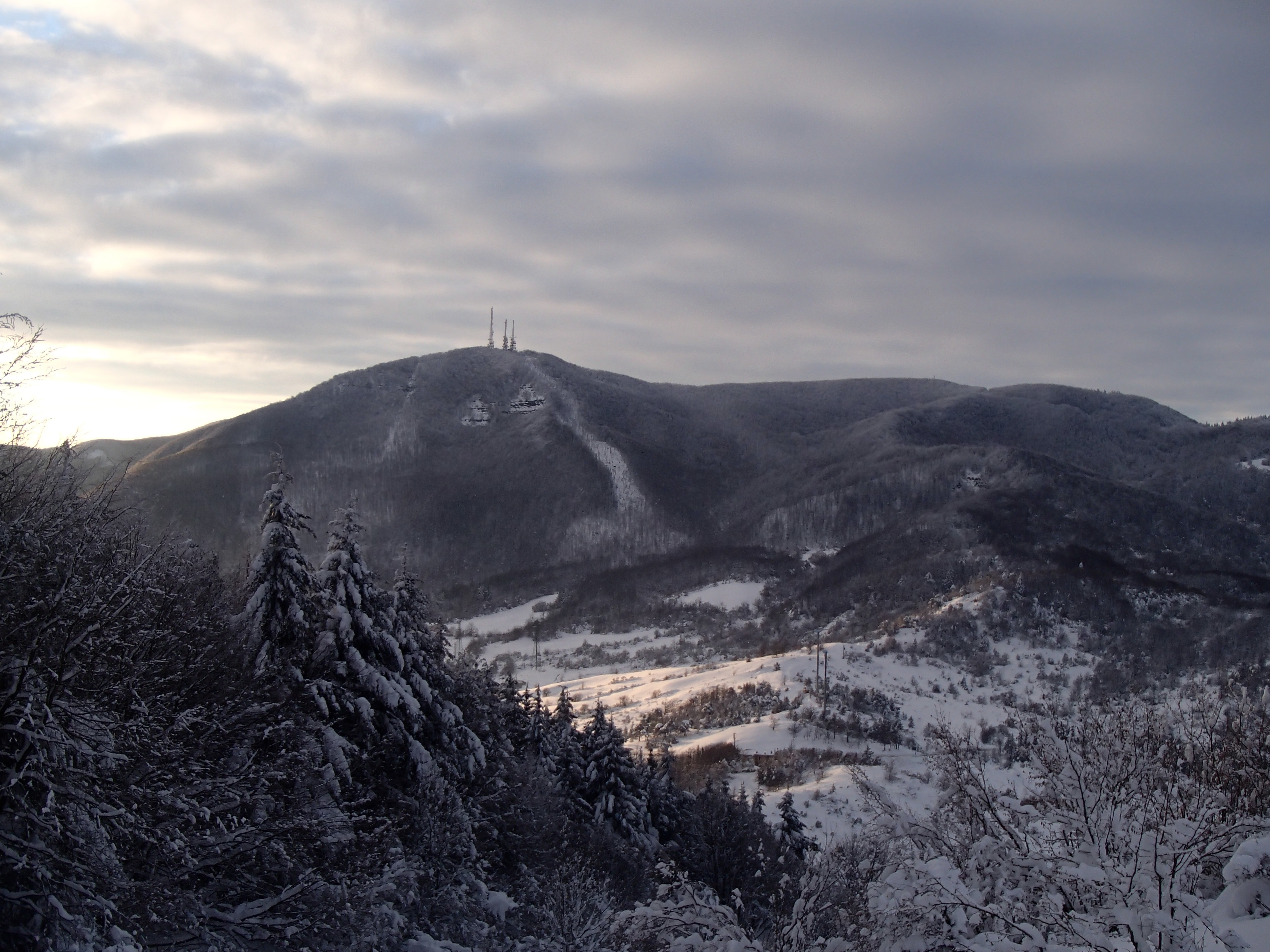 foto di monte oggioli (con le antenne) innevato visto da monte canda